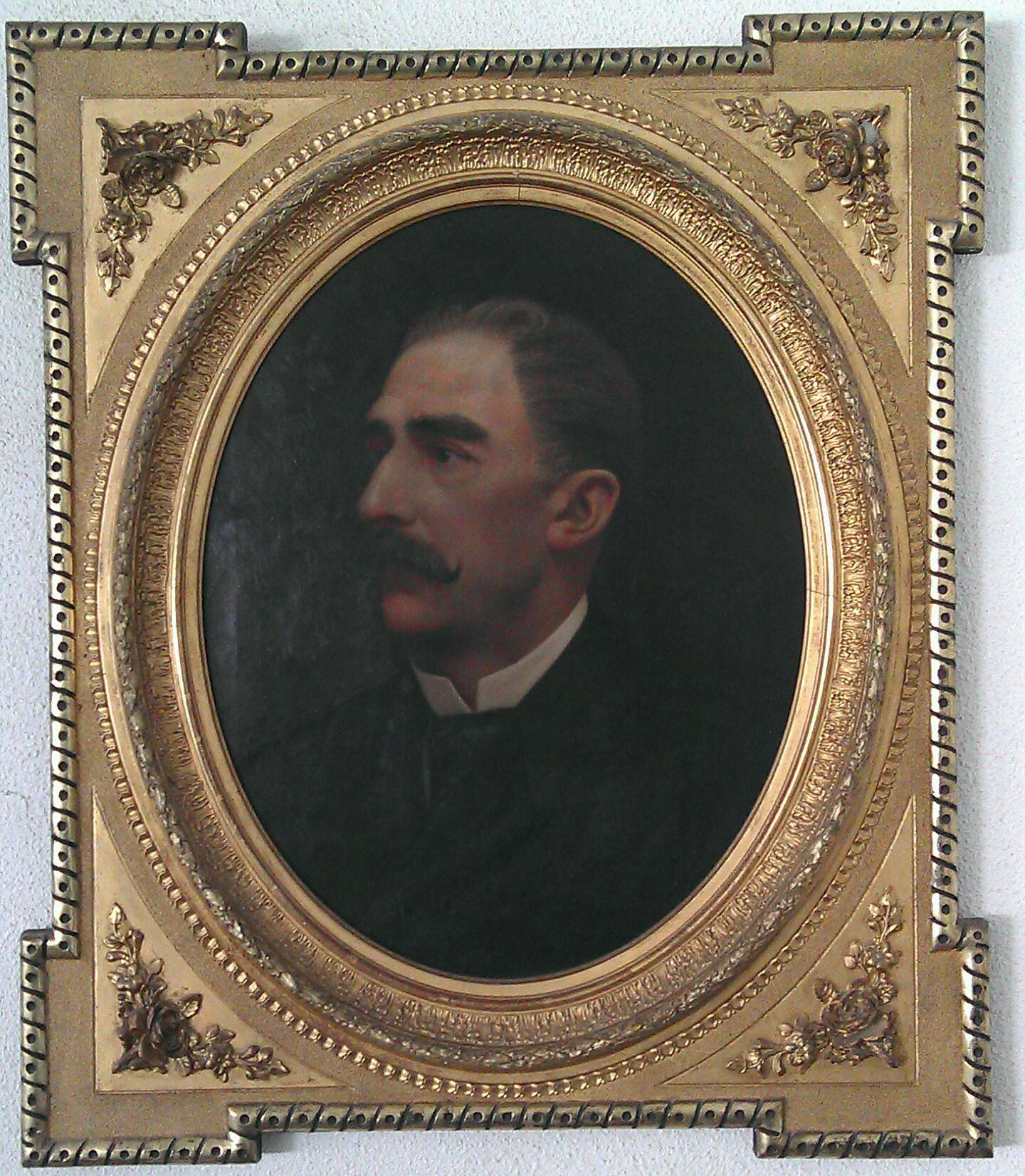 Retrato